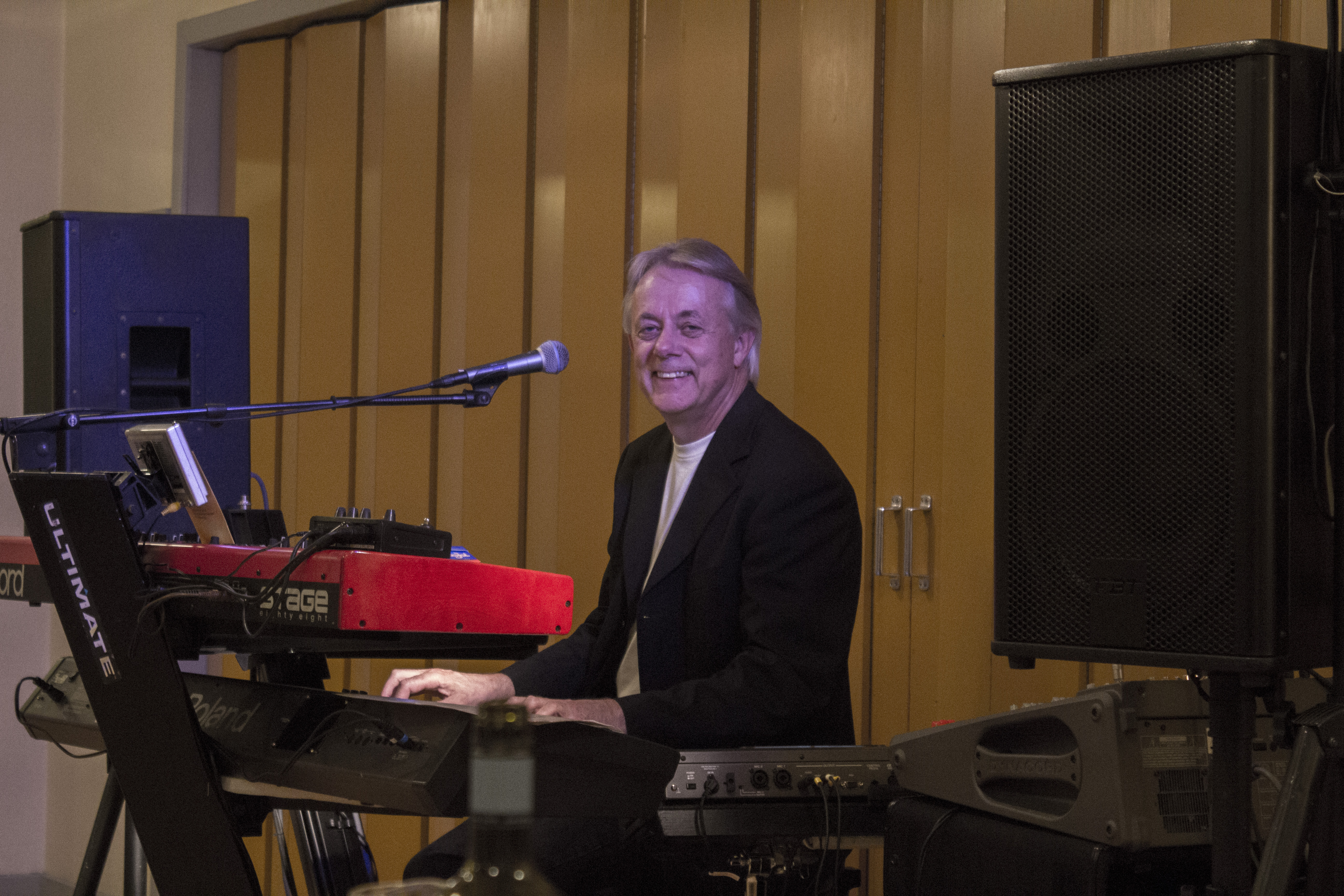 Jens Bækkelund, fest på Vestfyn i 2012.